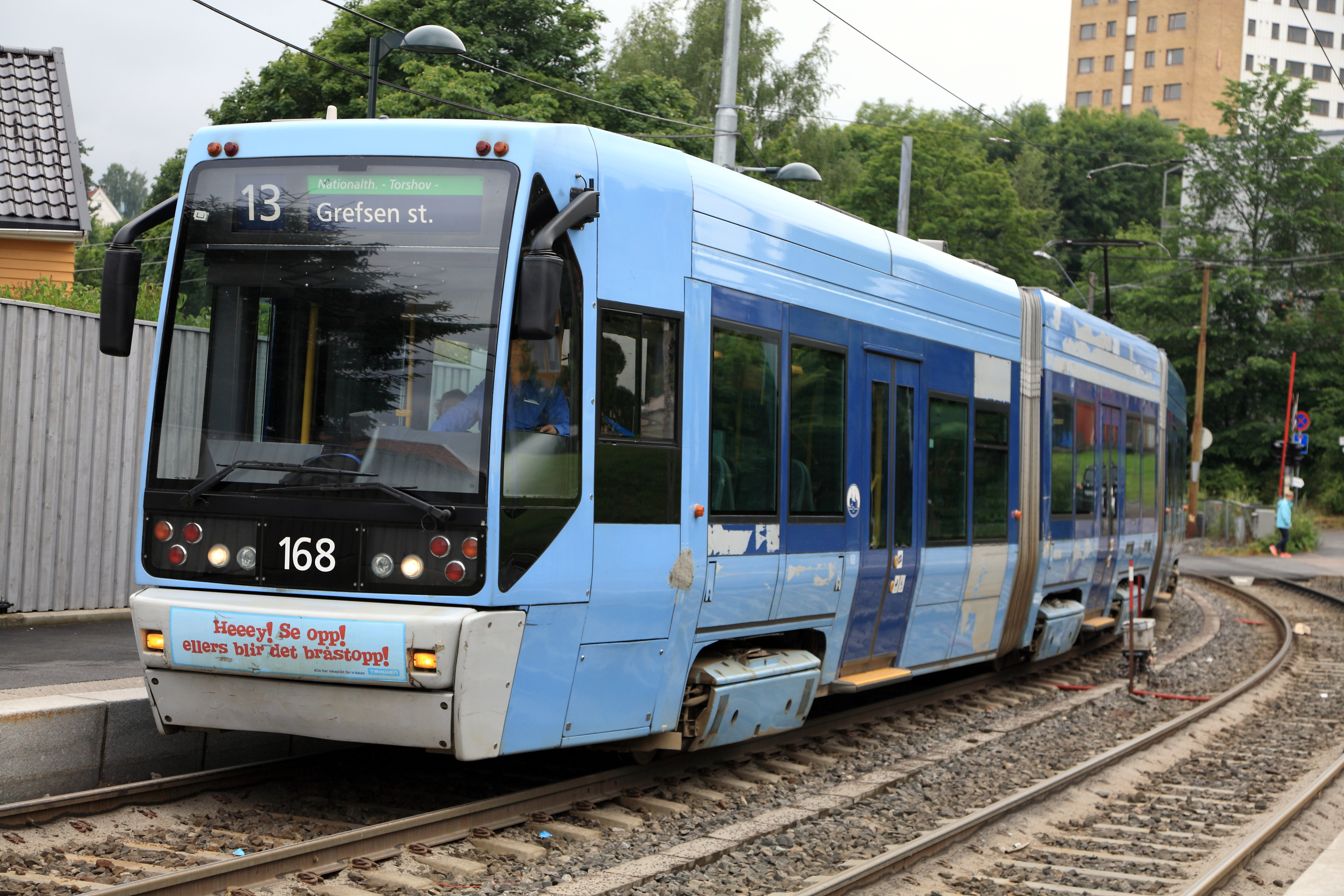 Zweirichtungsgelenkwagen der Reihe SL95 nach Grefsen. Nur diese Fahrzeuge verkehren derzeit planmäßig bis und ab Jar.